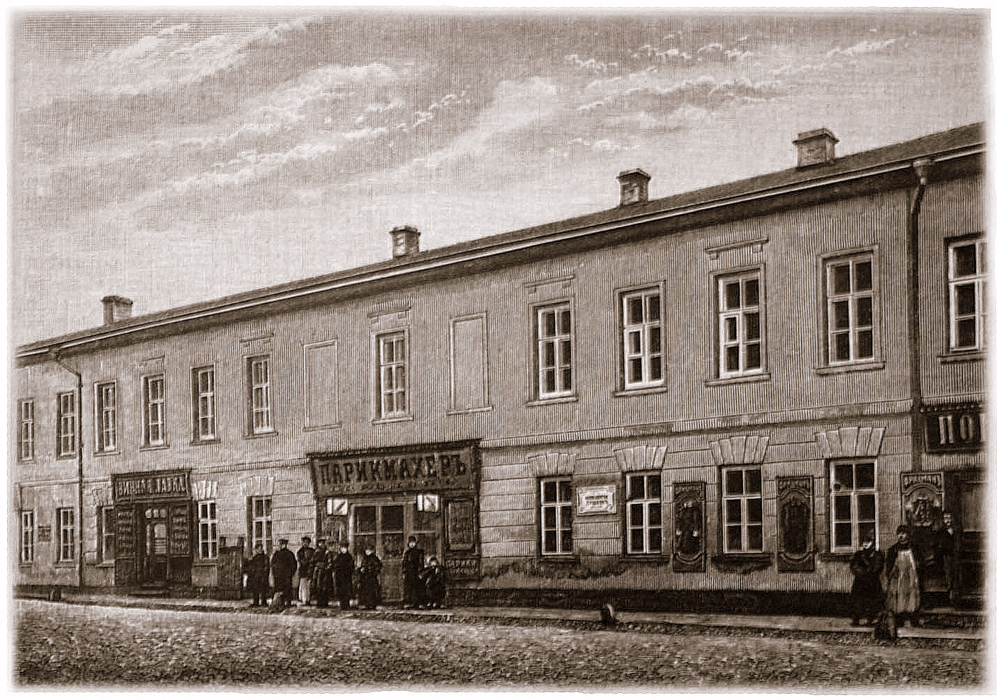 Дом на Немецкой улице в Москве (Бауманская, дом. 57 б) , где родился А. С. Пушкин, как считалось до революции. На репродукции видна доска из мрамора. Альбом к 100-летию А.С.Пушкина. 1899 год. Идательство А. Ф. Маркса. Переиздание: Юбилейный альбом А. С. Пушкина. - Спб.: Идательство В. А. Михайлова, 2004 год. - С.120. ISBN 5-8016-0230-5 стр. 9